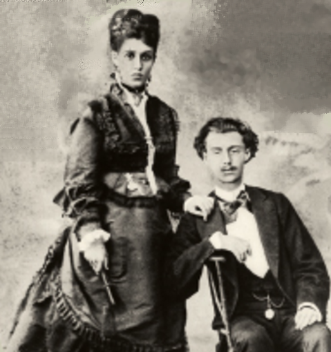 Eduardo Palassin Guinle (1846-1912) e esposa Guilhermina (1854-1925), avós do playboy brasileiro Jorge Guinle.